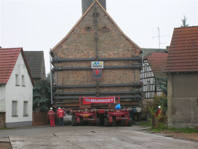 Überführung der Emmauskirche von Heuersdorf nach Borna